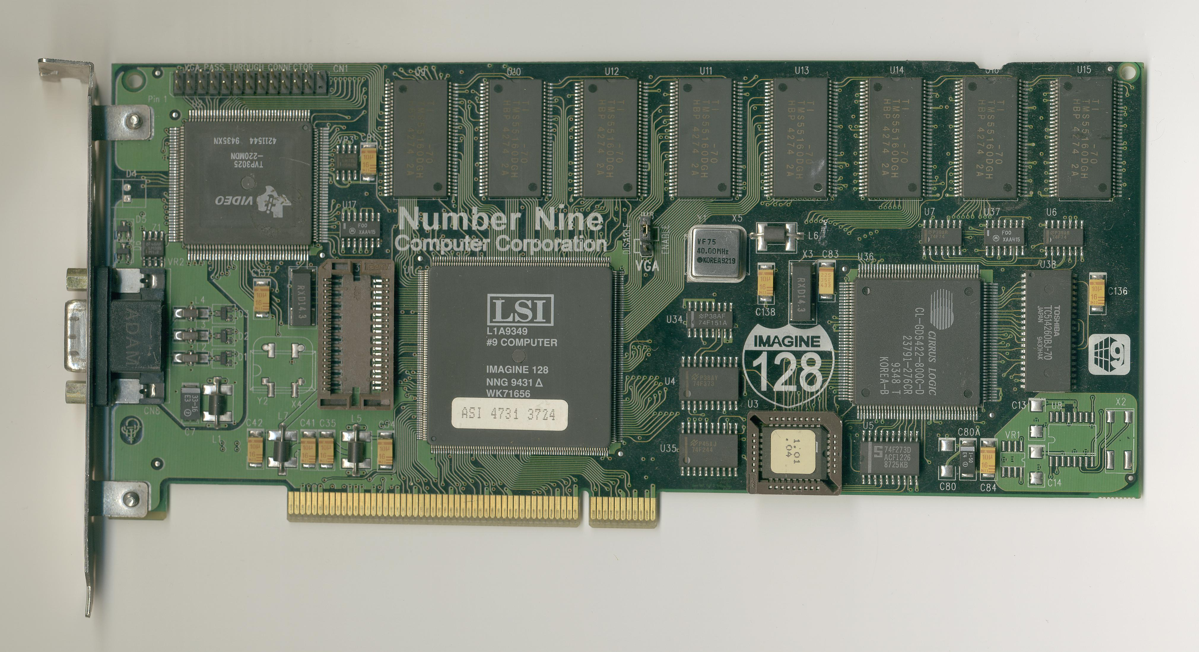 NumberNine Imagine128 1280 PCI 4MB